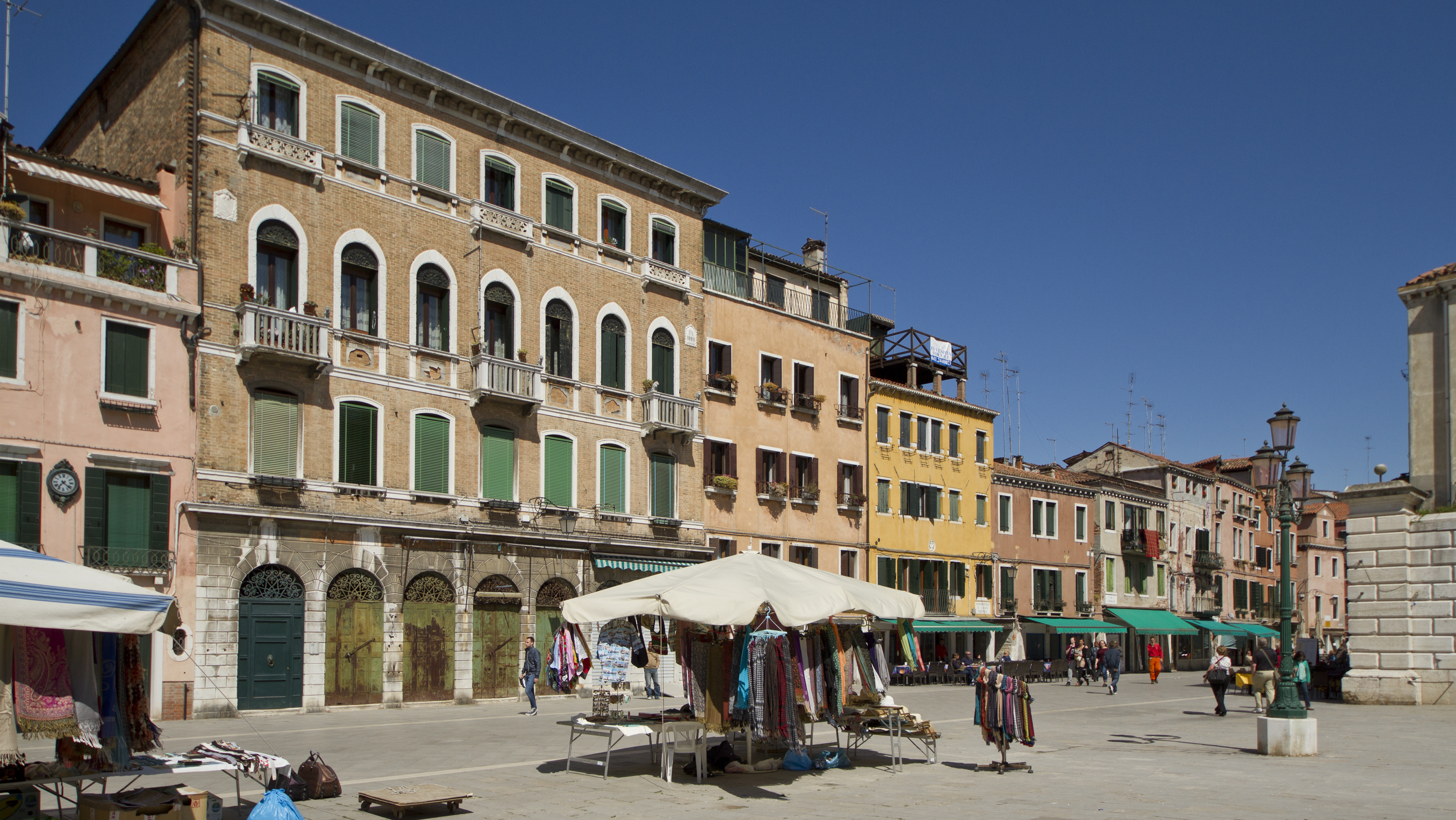 Castello, 30100 Venezia, Italy